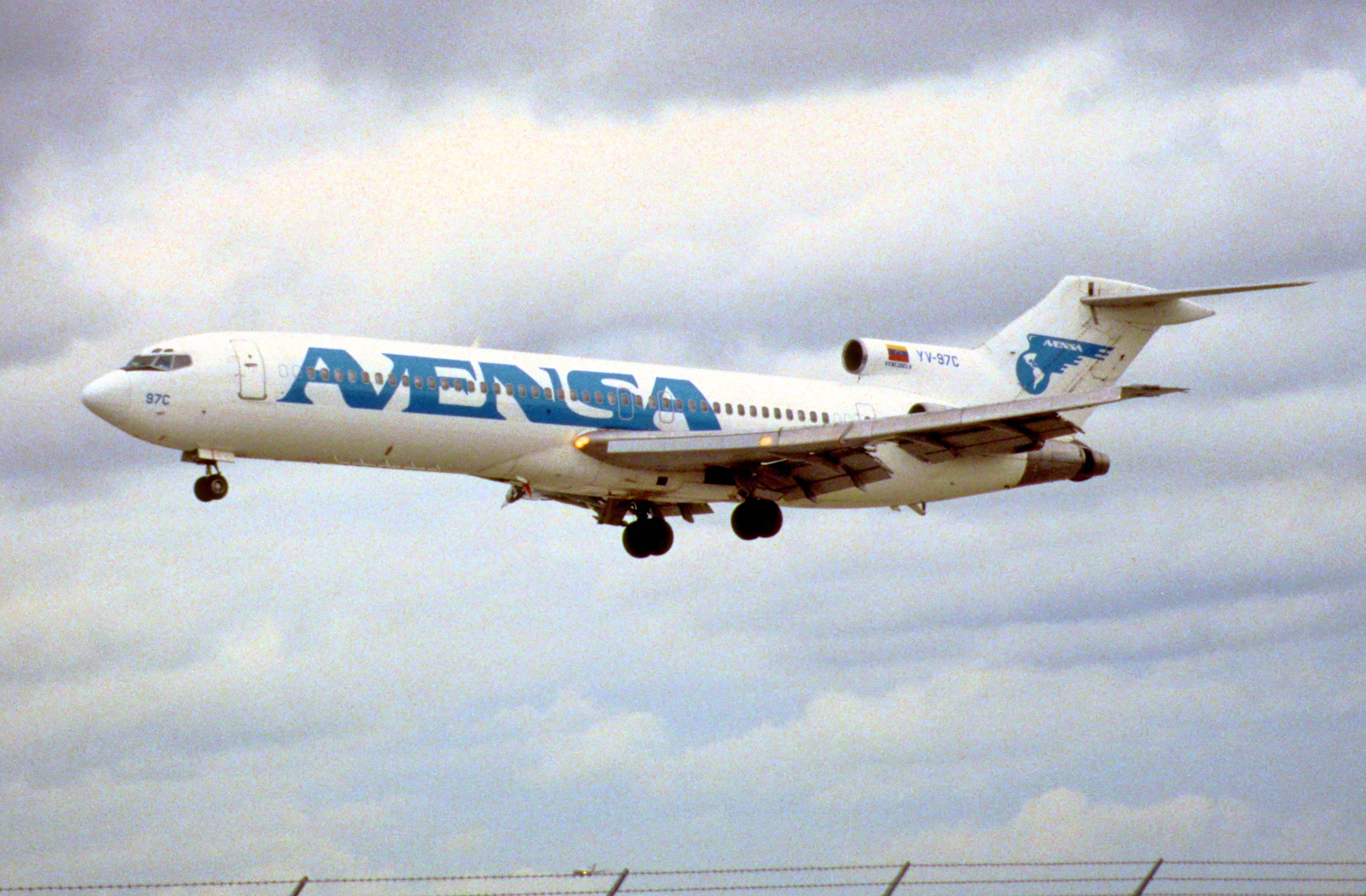 8gg - AVENSA Boeing 727-2D3; YV-97C@MIA;24.01.1998